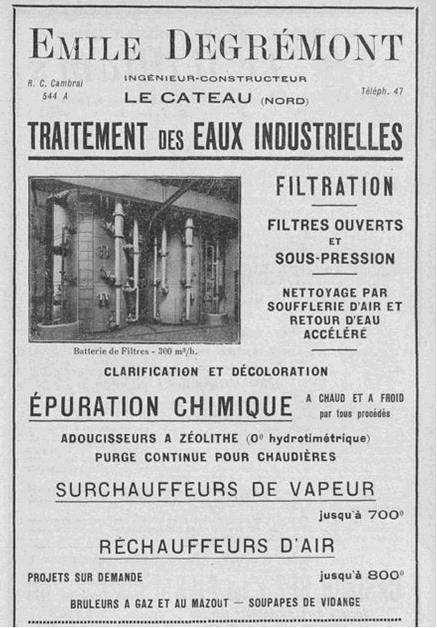 Emile Degrémont, ingenieur constructeur, traitement des eaux industrielles, Le Cateaux, Nord de la France ; 1910